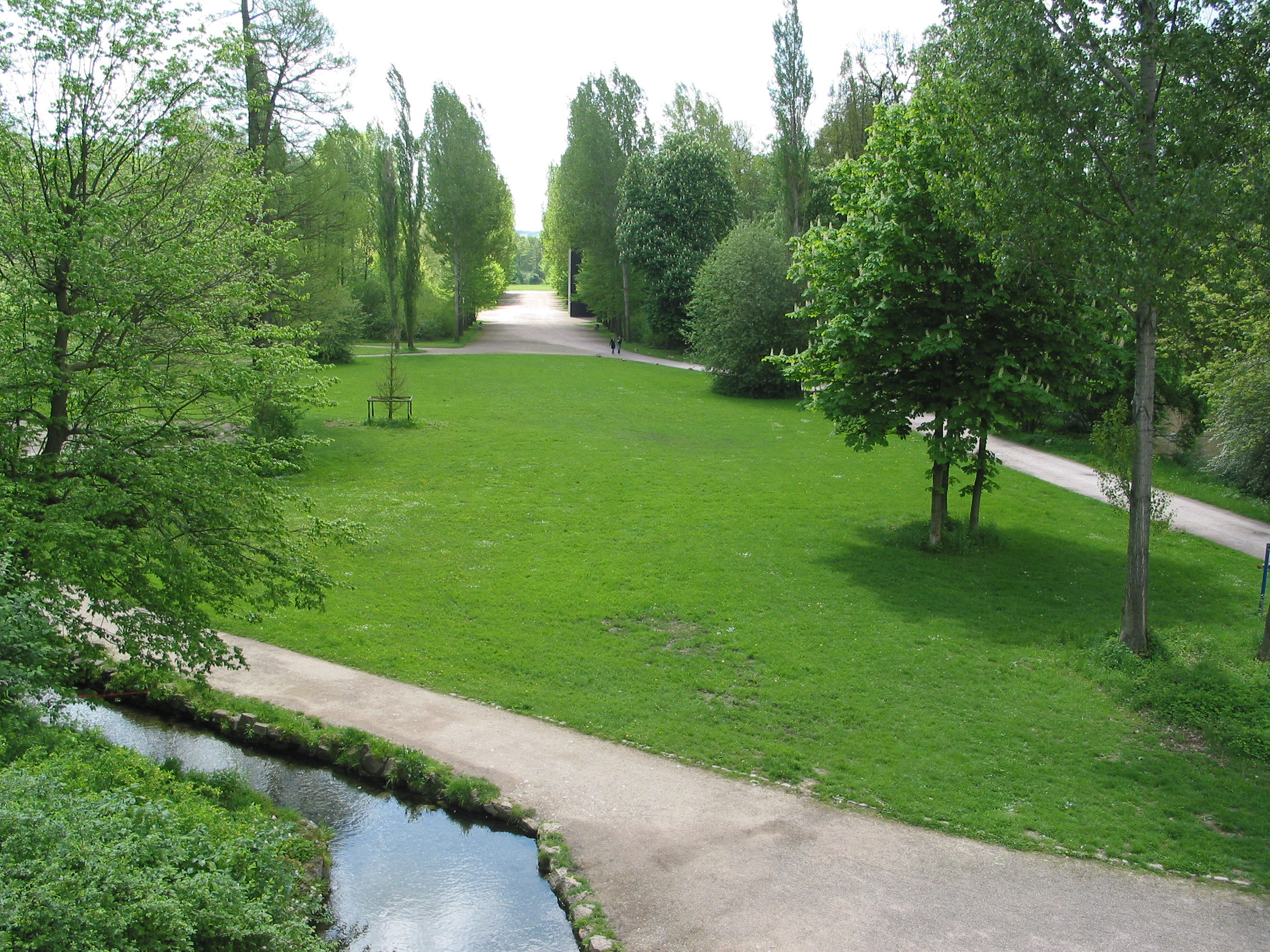 Der Park an der Ilm in Weimar, hier der Blick von der Schlossbrücke zum Stern.